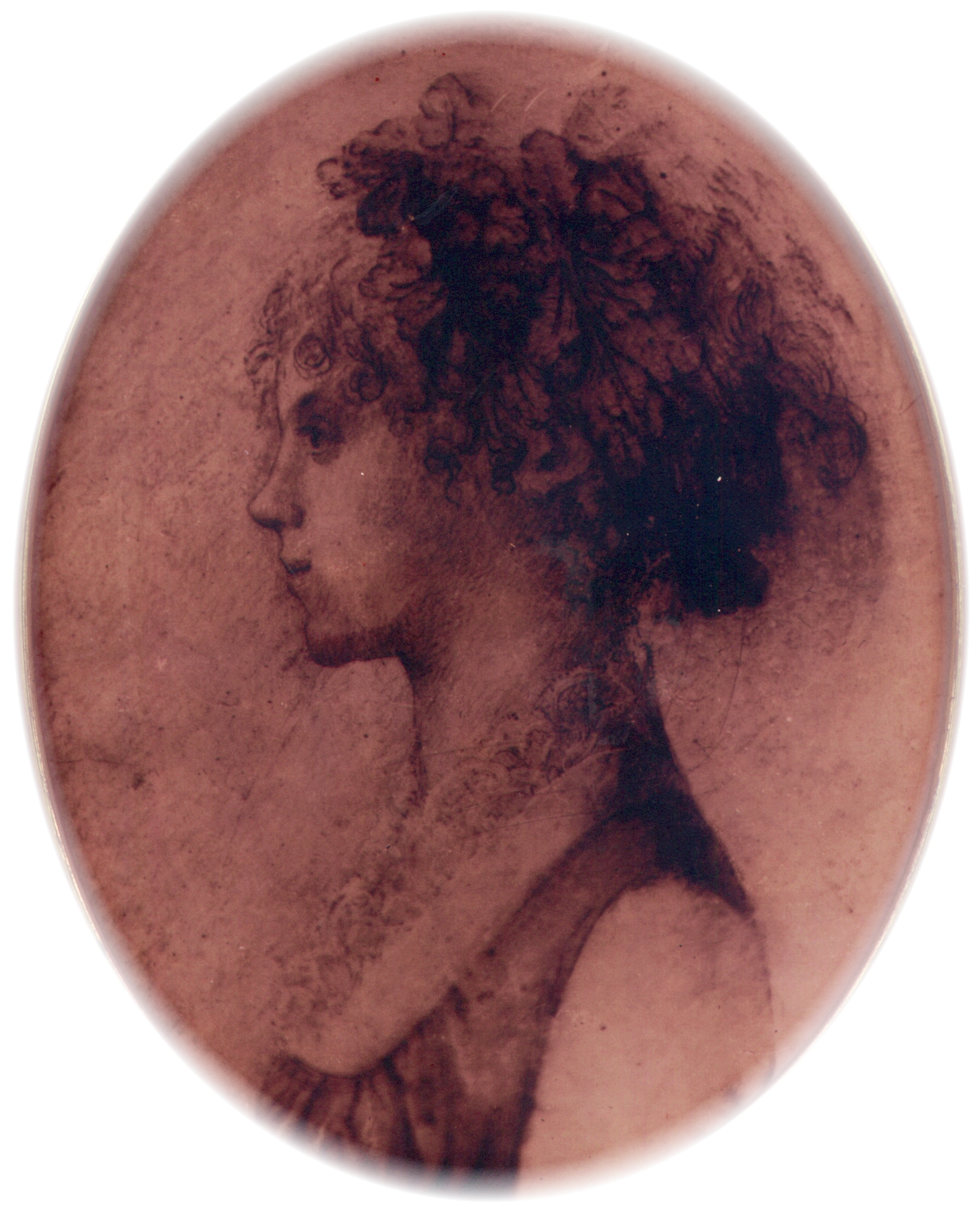 Juliane Schreiber, geb. Oettelt (16.5.1786 Eisenach - 3.10.1812 Lengsfeld), Ehefrau des Philosophen Christian Schreiber und Tochter des Geheimen Landesdirektionsforstraths Friedrich Wilhelm Oettelt in Eisenach, Kupferstich 1806